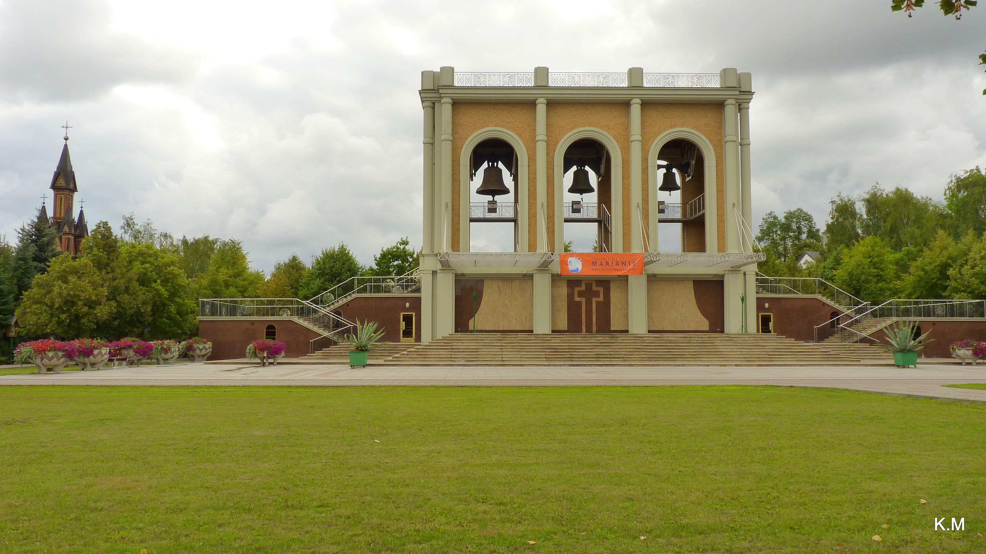 Licheń - Marianie ; dzwonnica.